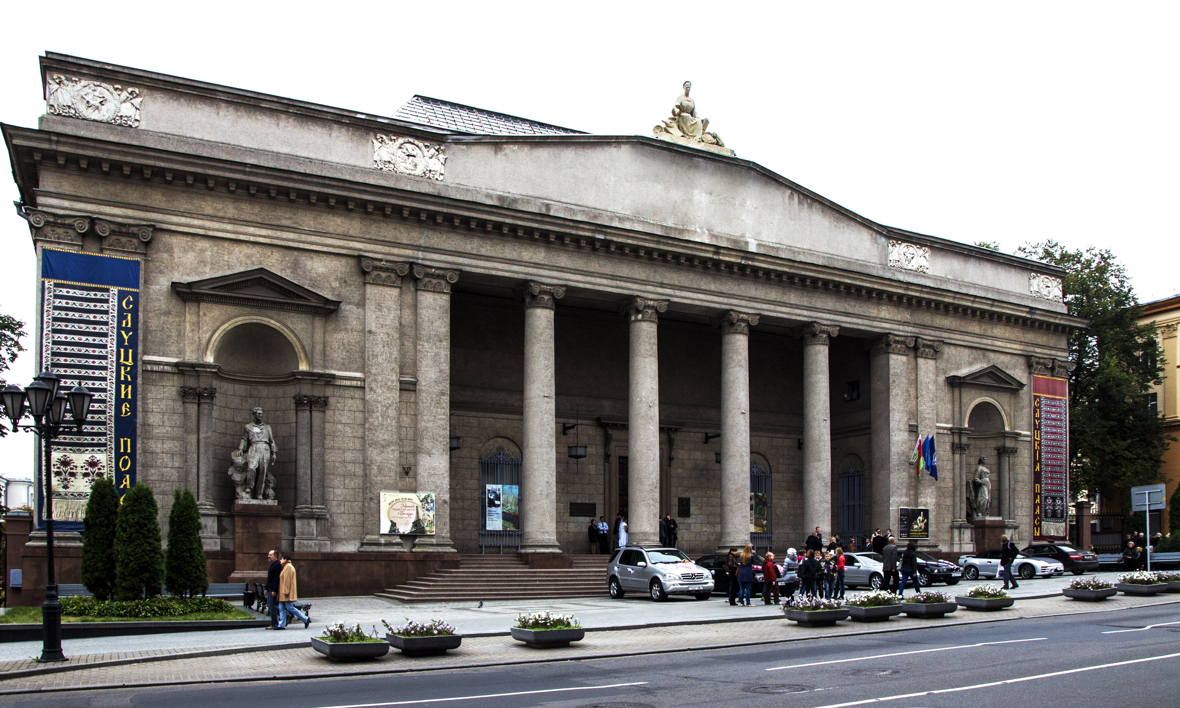 Беларуская (тарашкевіца): Будынак Нацыянальнага мастацкага музэя Беларусі. г. Менск This is a photo of Belarusian heritage monument. Reference number: 712Г000102 ( WLM)